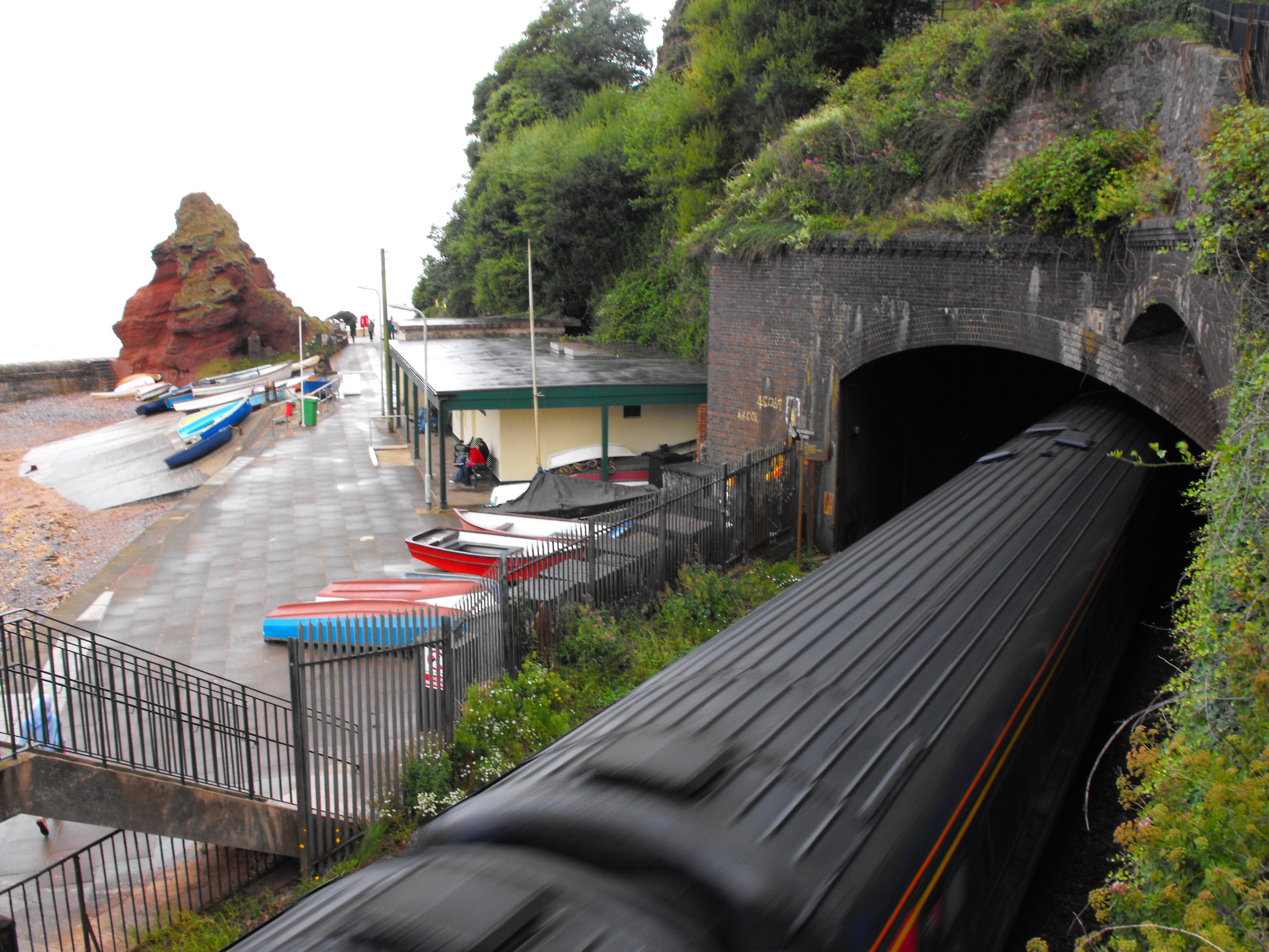 Kennaway Tunnel